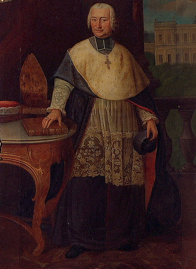 Prince-évêque Charles-Nicolas d'Oultremont